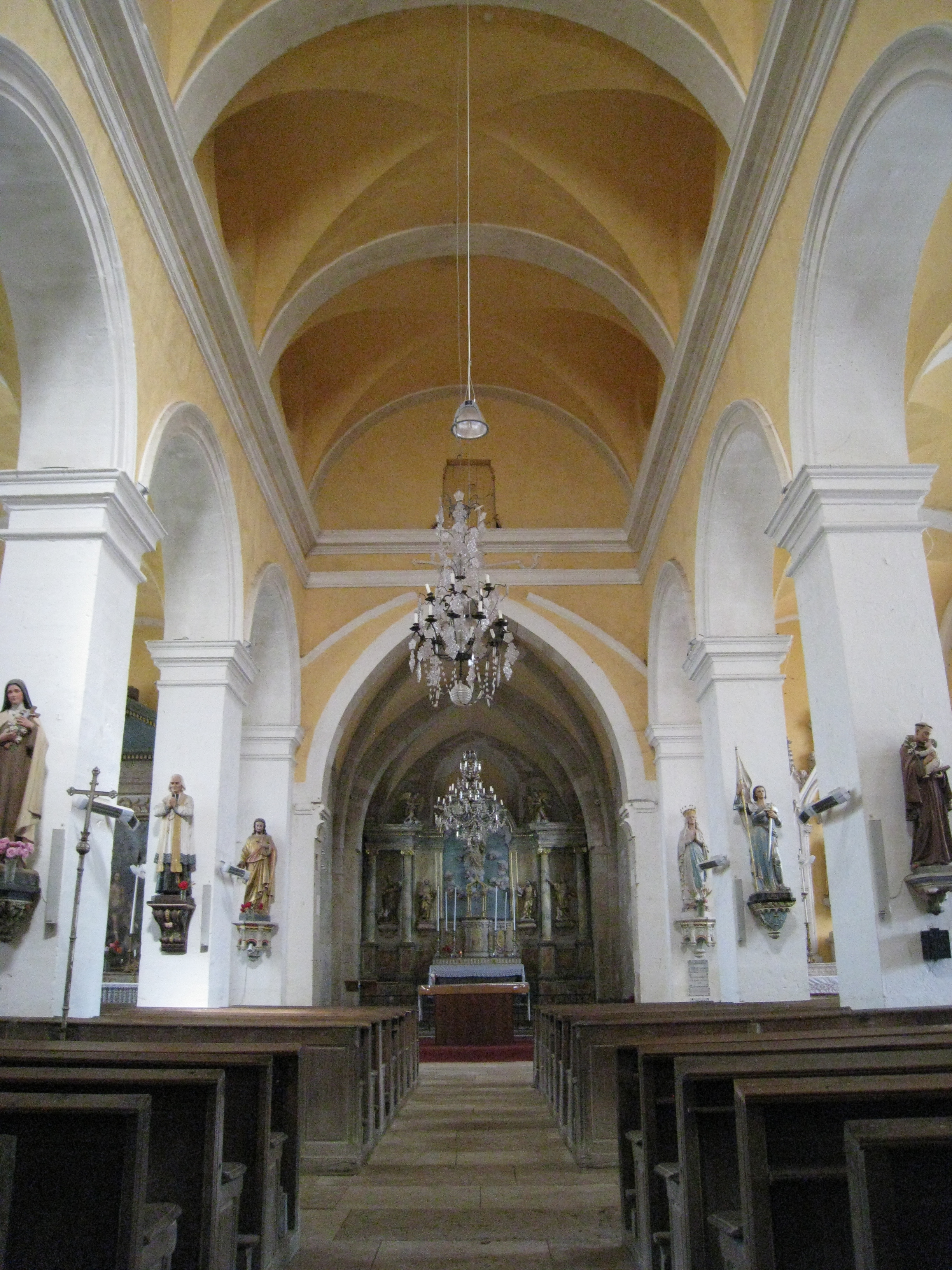 Intérieur de l'église de Baissey, département de la Haute-Marne, région Champagne-Ardennes, France